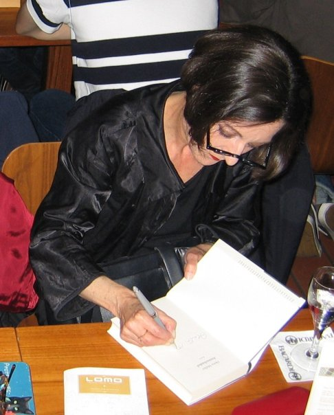 Herta Müller signiert bei der 1. SWR-Literaturnacht in der Mainzer Buchbar Lomo ihren Roman "Atemschaukel"